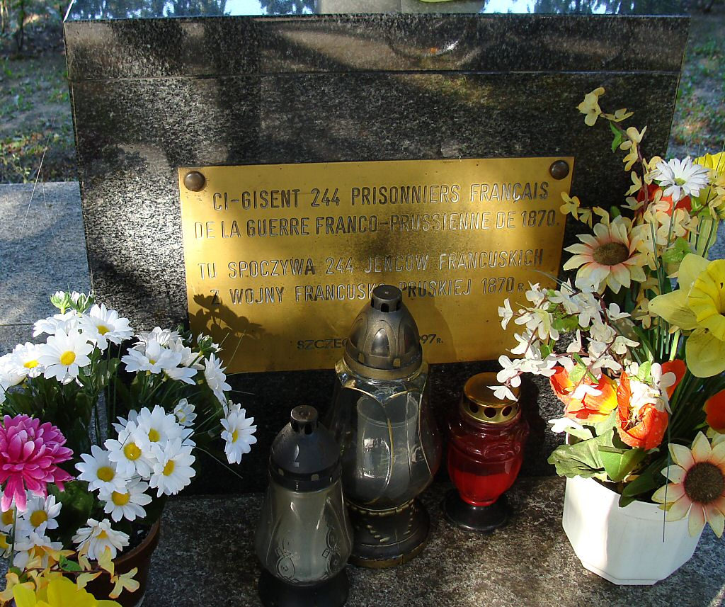 Pomnik jeńców francuskich przy ul. Litewskiej w Szczecinie